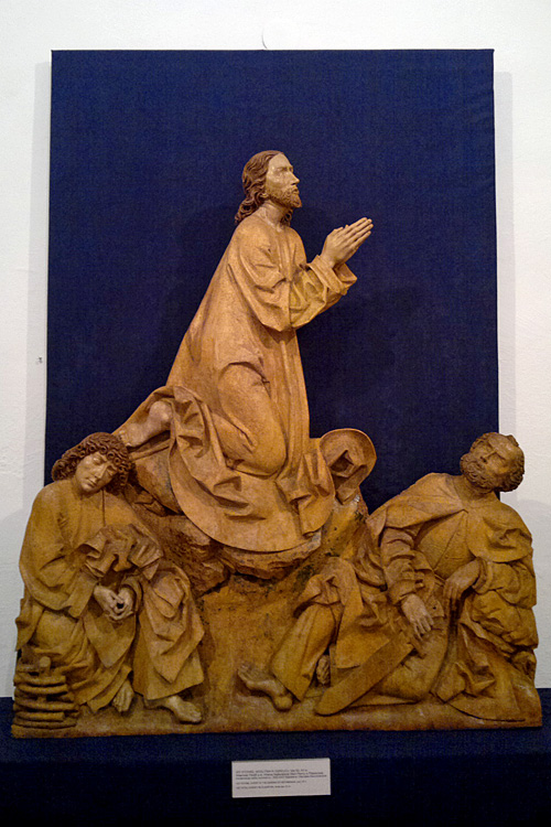 Zdjęcie późnogotyckiej płaskorzeźby z Ptaszkowej autorstwa Wita Stwosza, wykonane w Muzeum Okręgowym w Nowym Sączu, oddział Dom Gotycki.